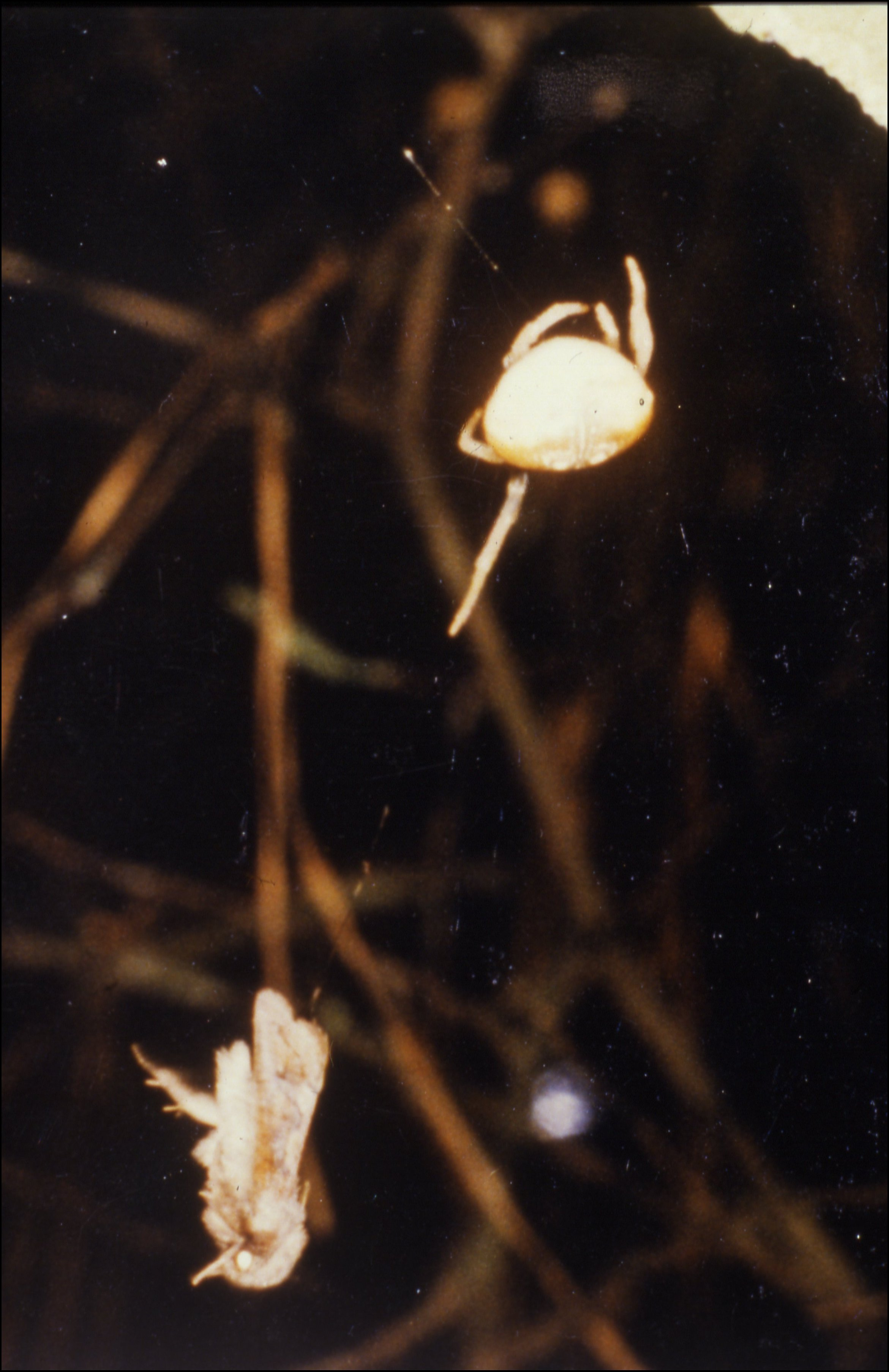 Mastophora cornigera venant de capturer un Hétérocère mâle qui s'est englué sur le bola